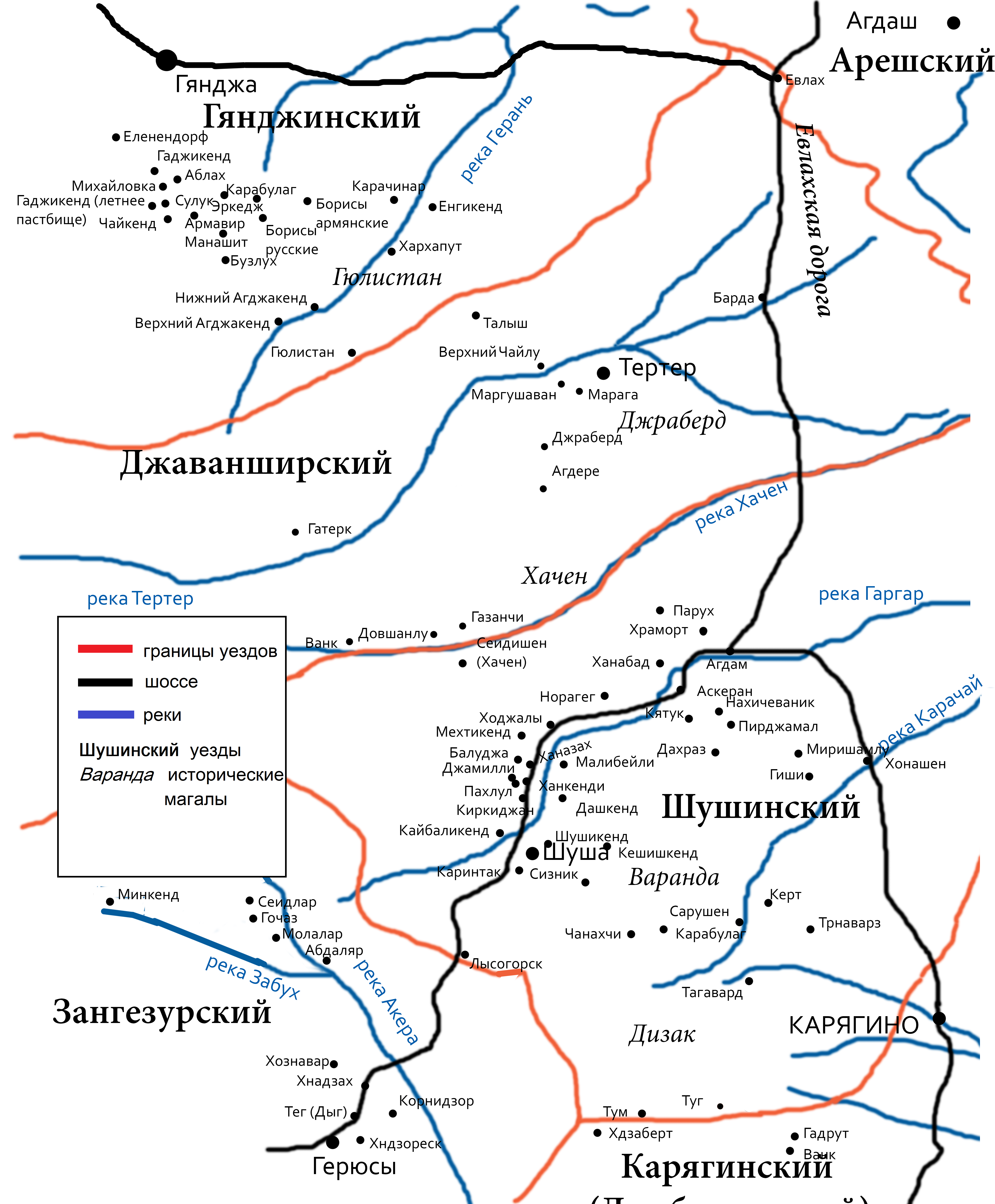 This map is my work, based on the map "The Struggle for Mountainous Karabakh, 1920" on the page of 146 of Richard Hovannisian's "The Republic of Armenia, Vol. III: From London to Sevres, February—August 1920"; Road map of Transcaucasia (Дорожная карта Закавказья; 1903); and Google maps.